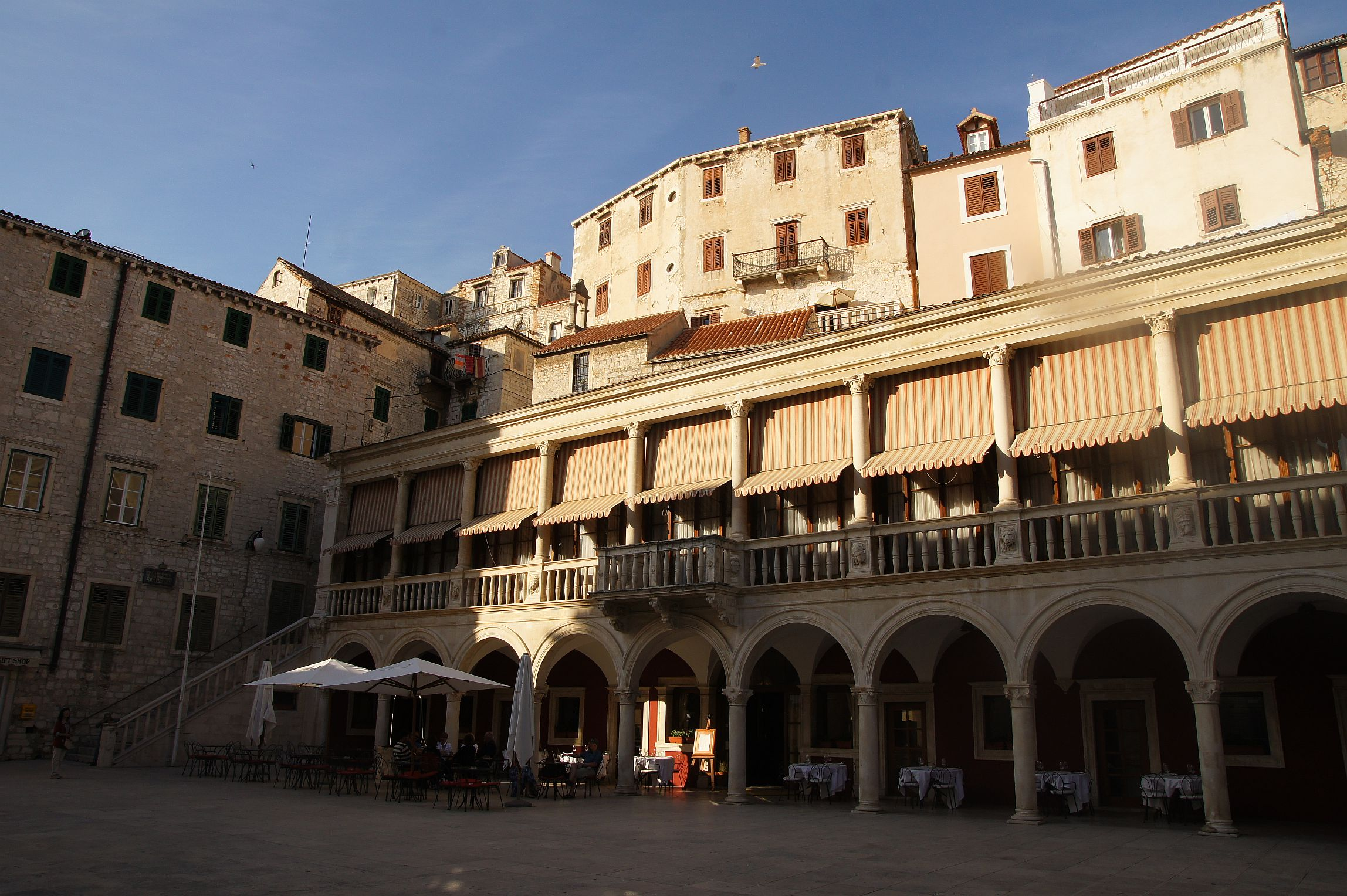 Nice place